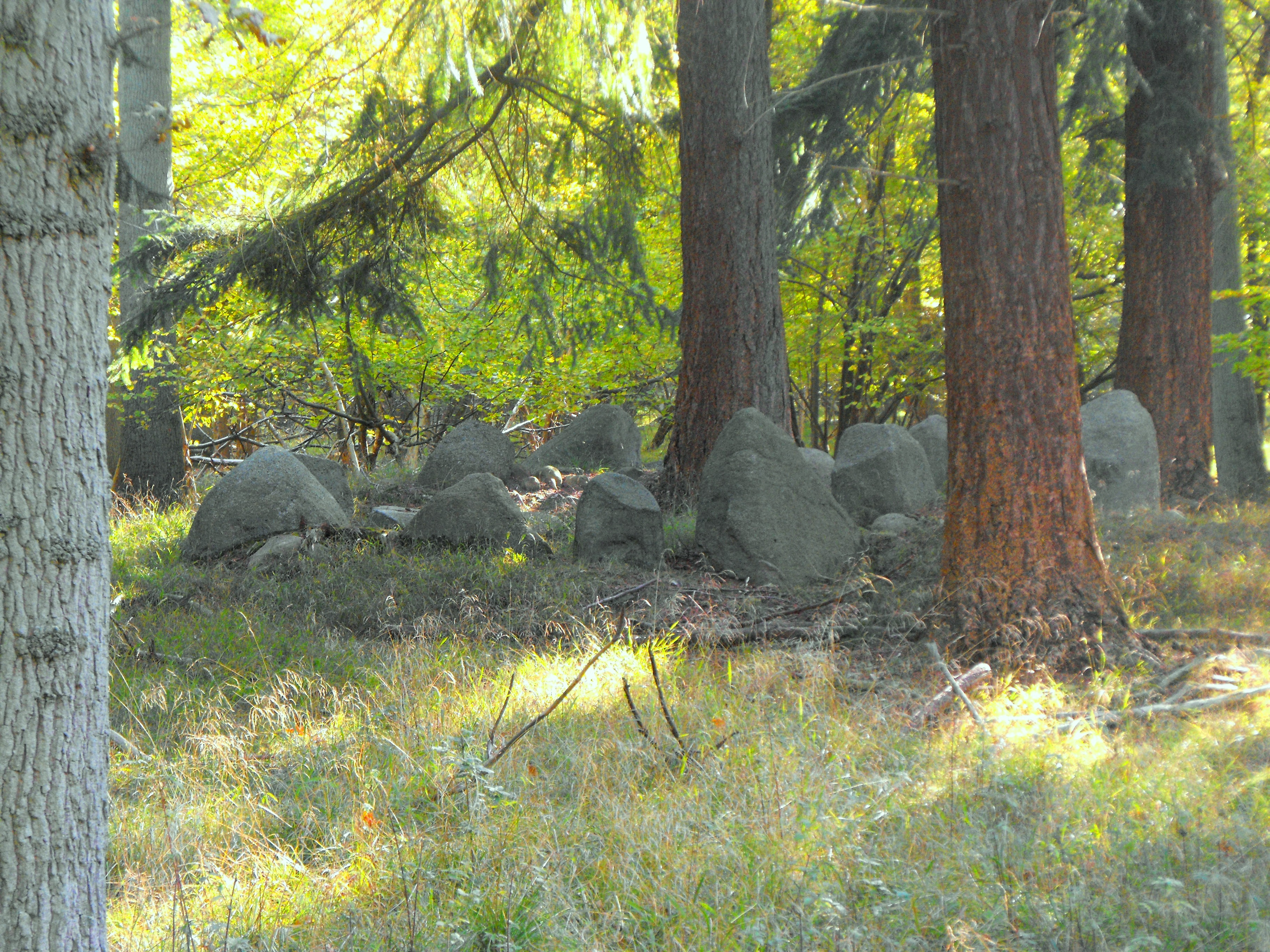 Oldtidsgrave i Roden Skov øst for Nysted Dolmens from Roden Skov near Nysted, Denmark